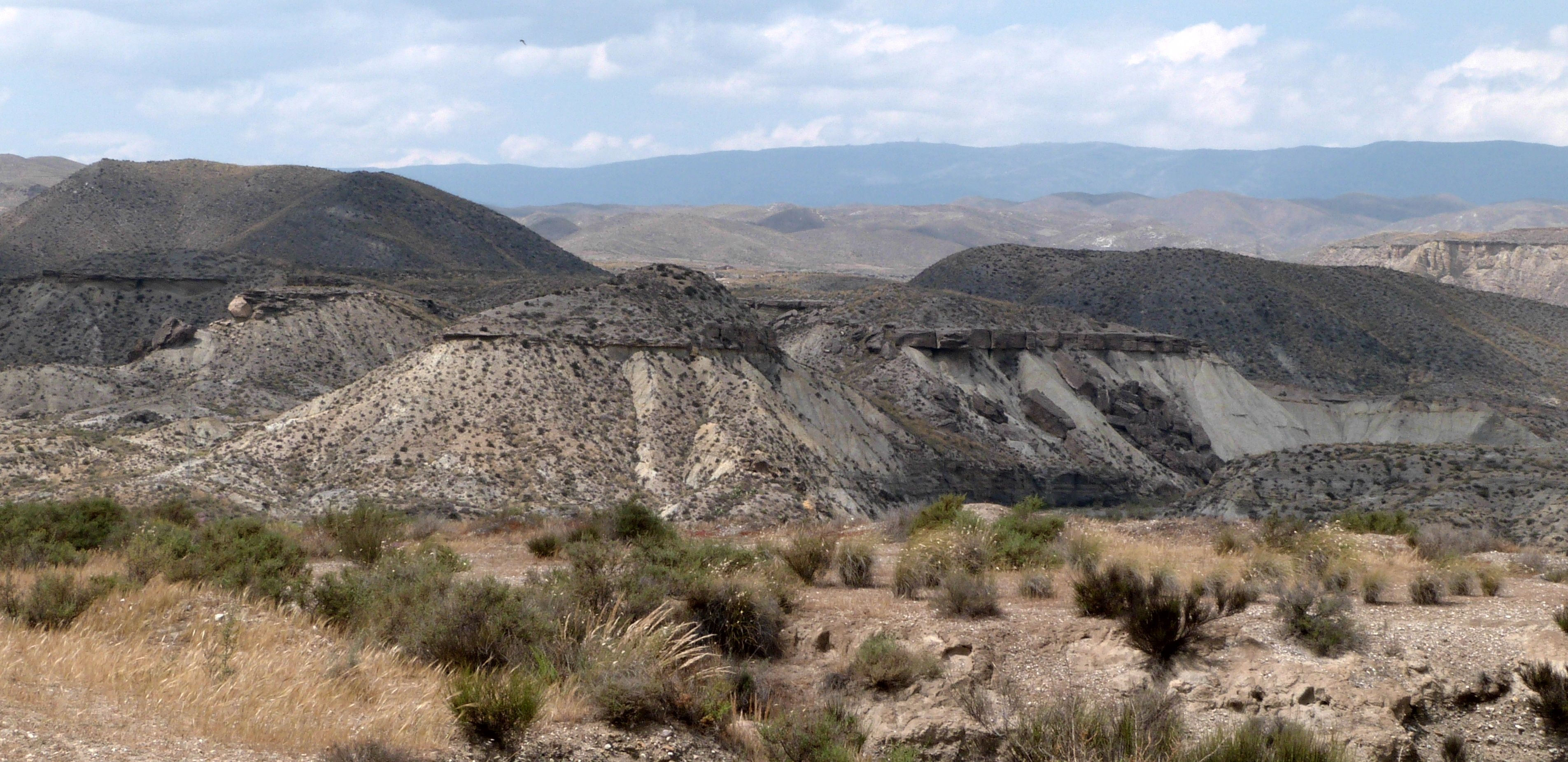 Desierto de Tabernas